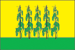 Флаг Гороховца Владимирской области